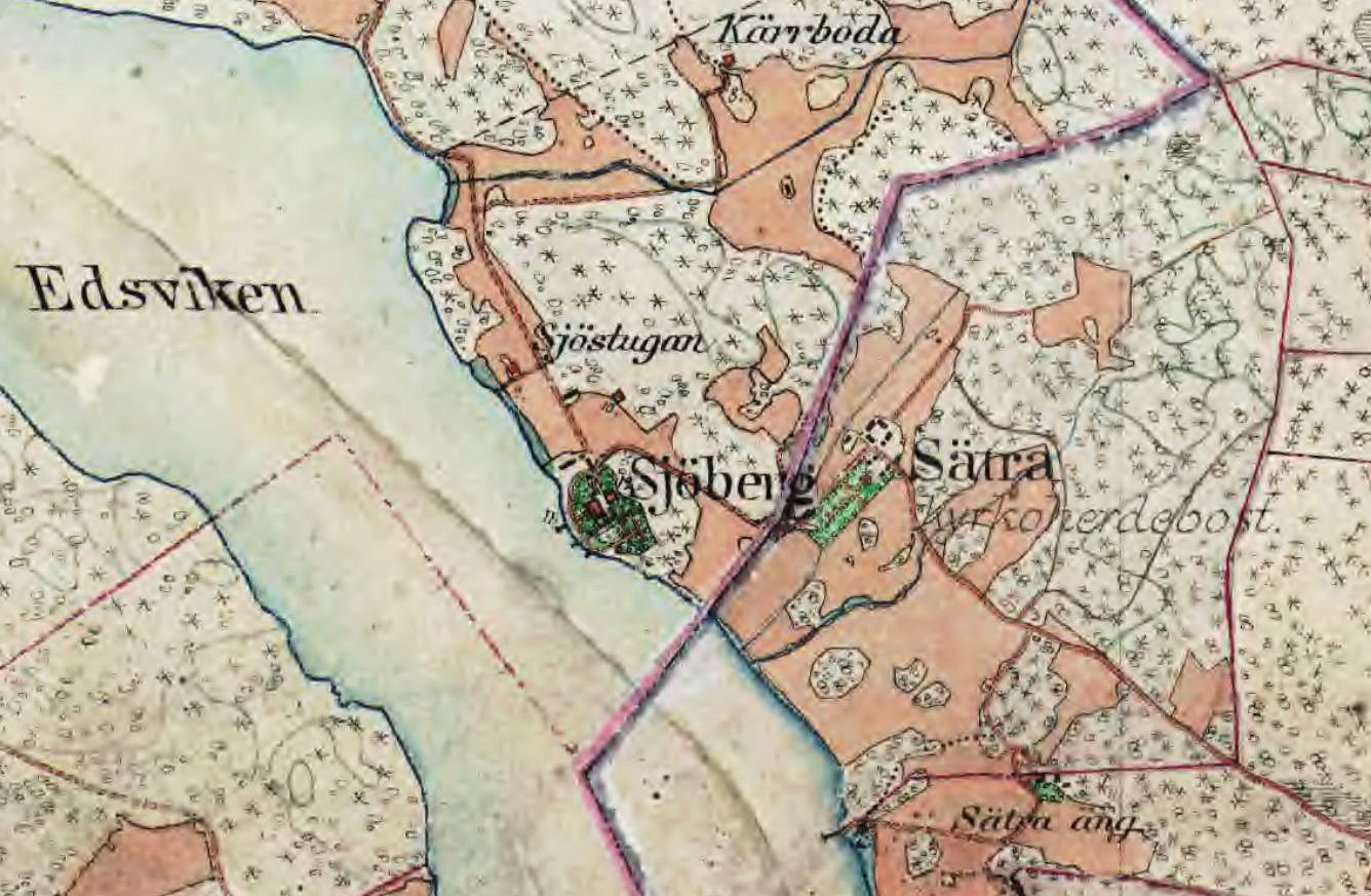 Sjöberg på Häradsekonomiska kartan